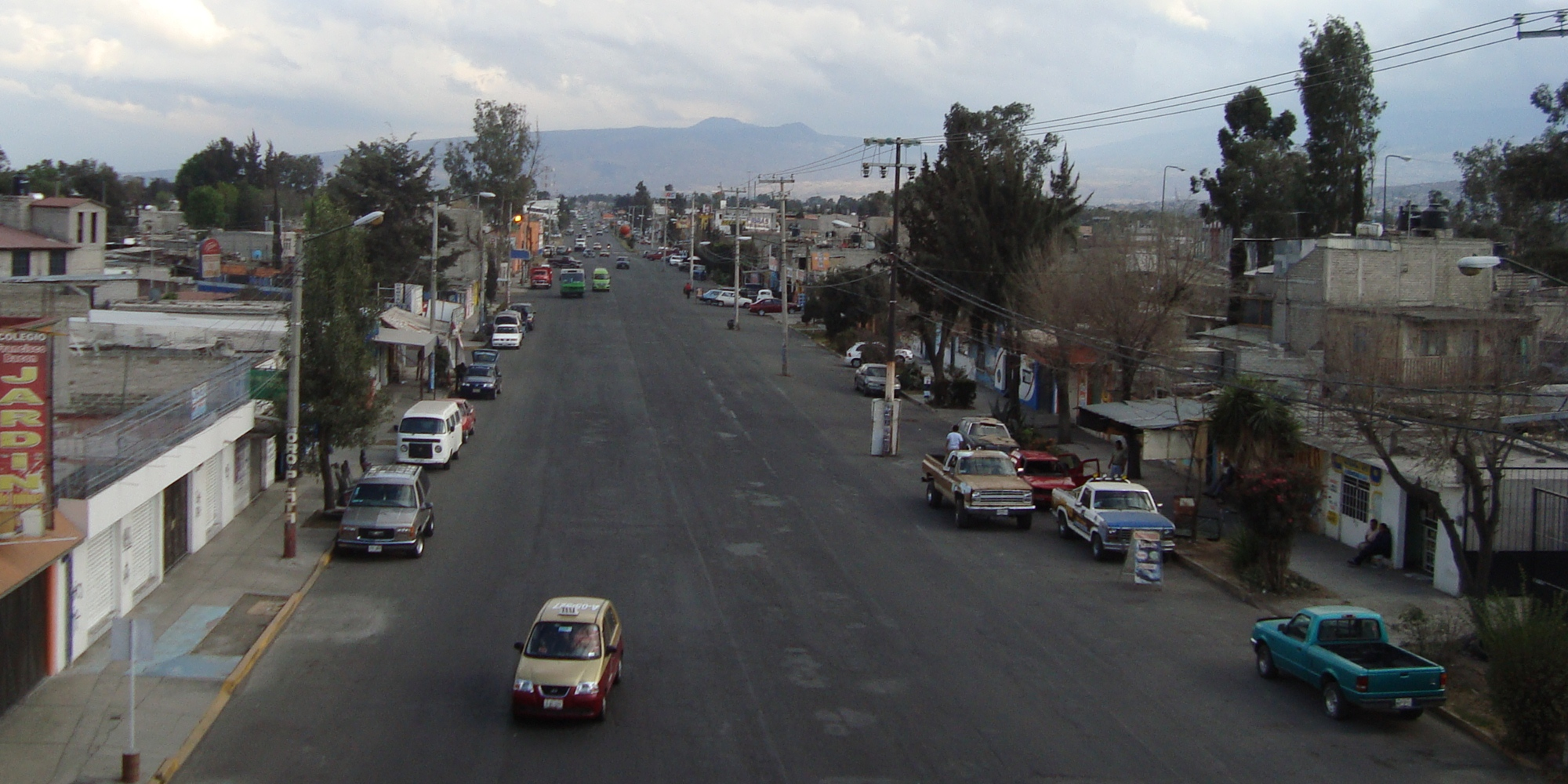 Vista de la avenida Tláhuac desde un puente localizado en la colonia Selene de San Francisco Tlaltenco (México).